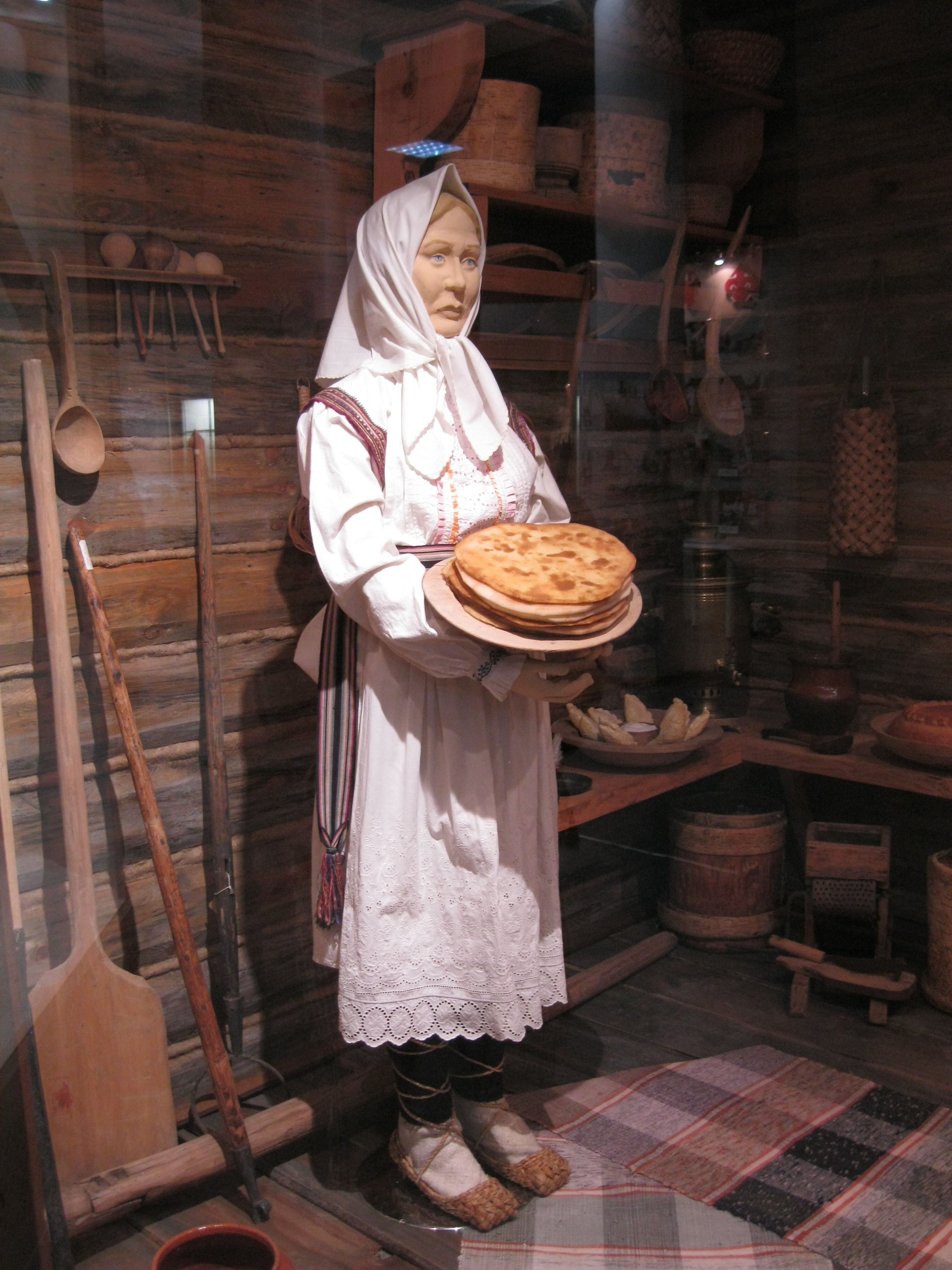 Блюда марийской празднично-обрядовой кухни. Экспозиция Национального музея Республики Марий Эл, Йошкар-Ола.